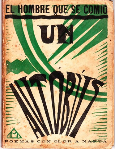 Portada de El hombre que se comió un autobús, de Alfredo Mario Ferreiro. 1ª ed. (1927)